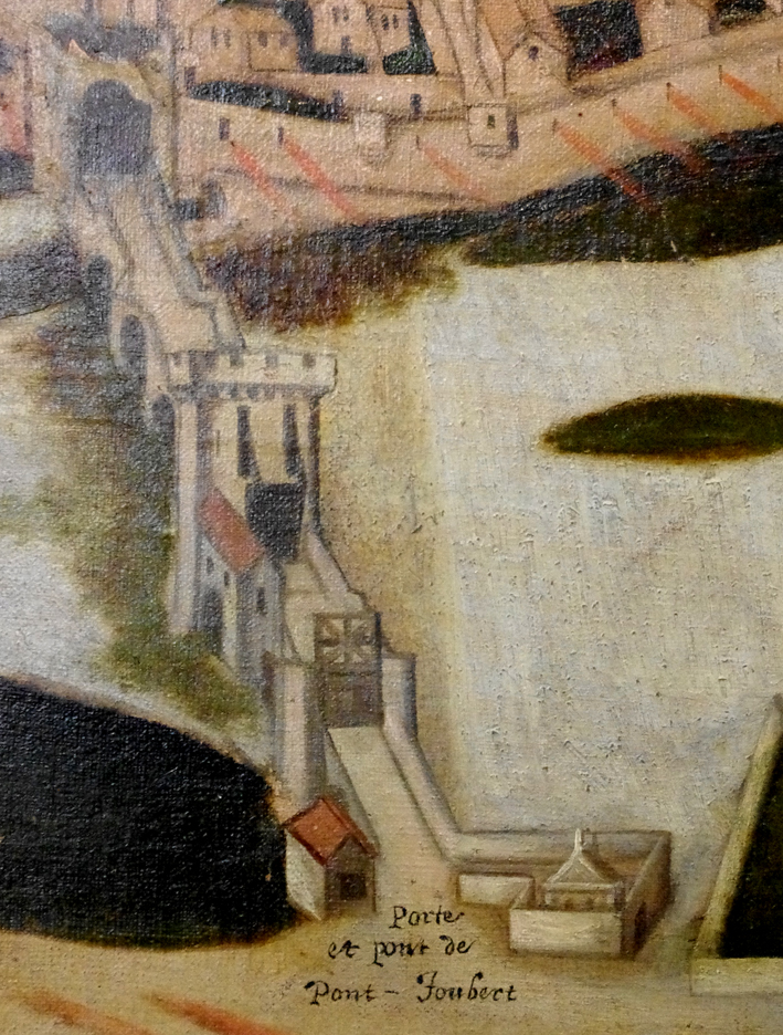 Détail du Siège de Poitiers en 1569, tableau de François Nautré (1619, musée de Poitiers). Vue du Pont Joubert et de la fontaine.